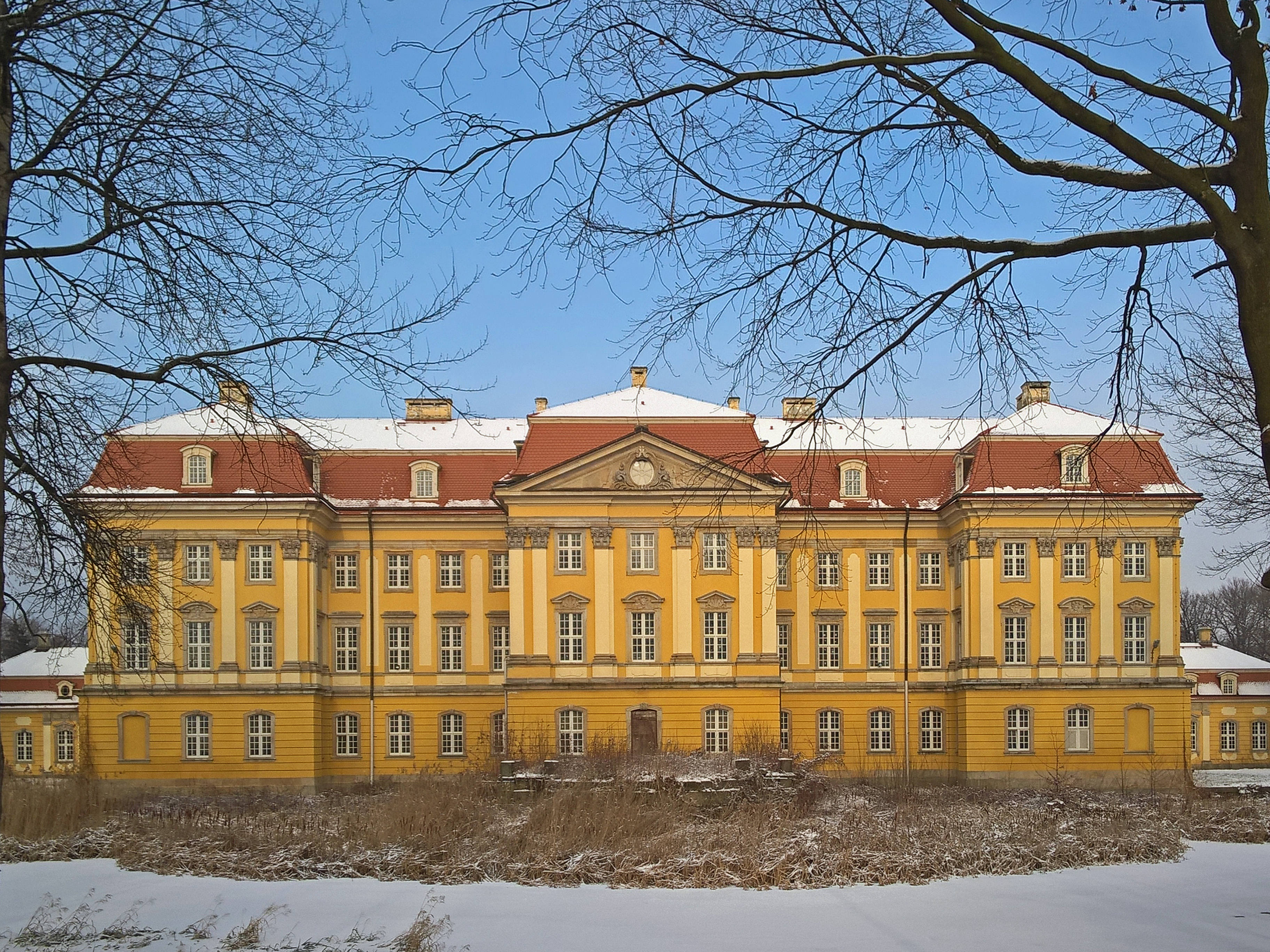 Stift Joachimstein in Radmeritz (Radomierzyce)